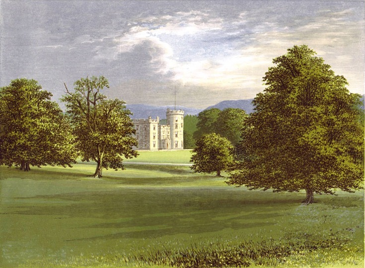 Castle Forbes, Alford, Aberdeenshire, Schottland